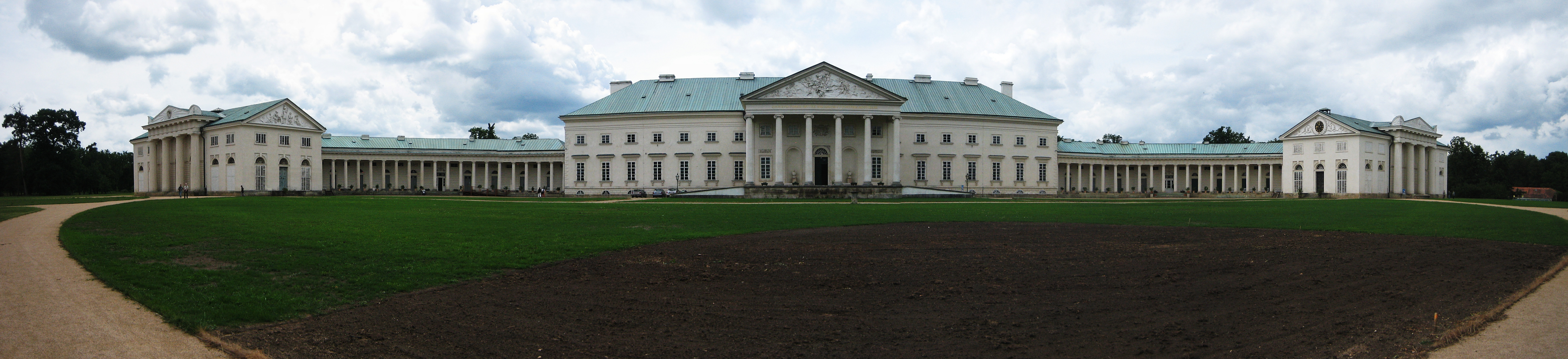 Zámek Kačina Svatý Mikuláš